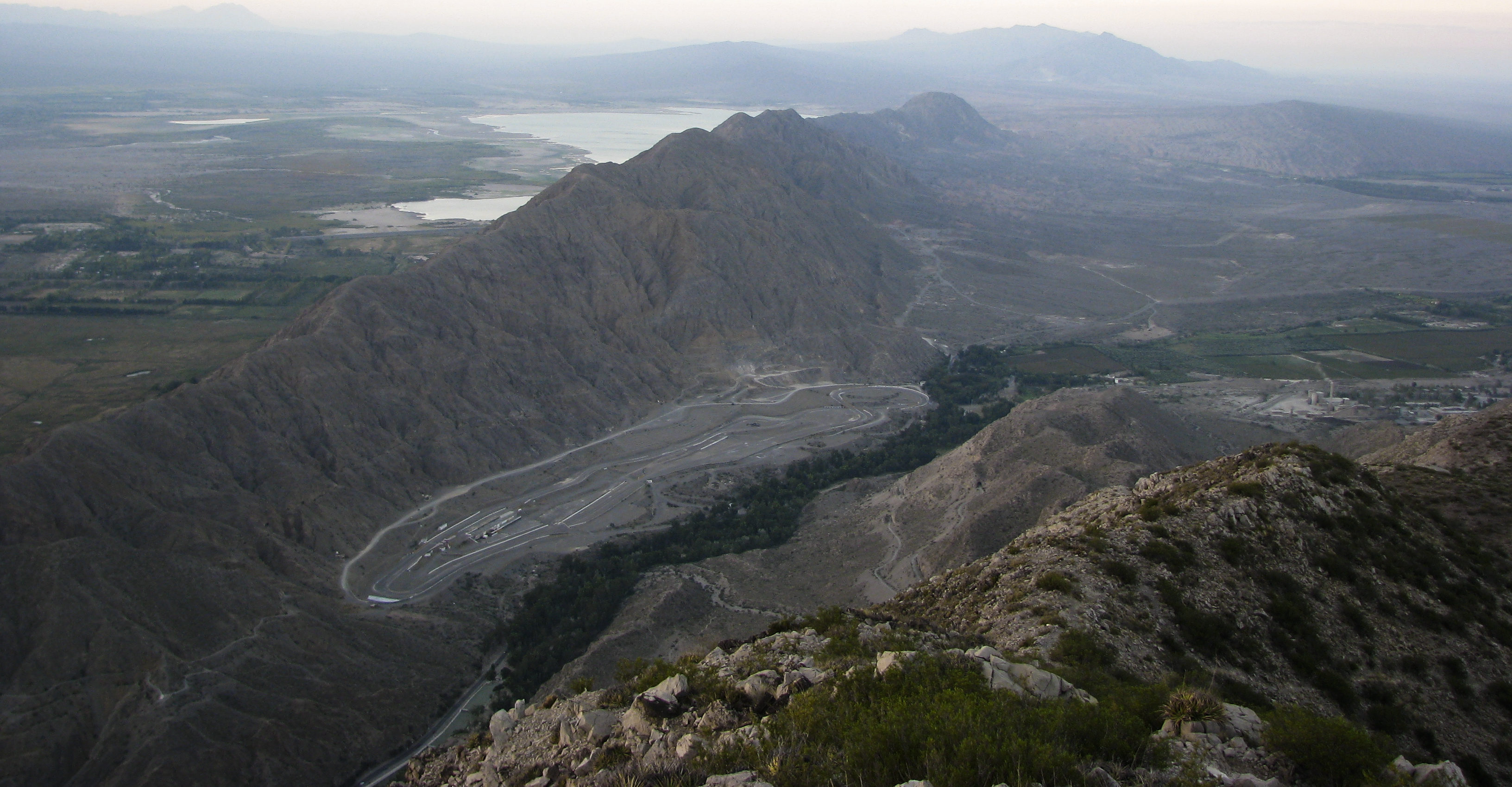 Quebrada de Zonda desde el Cerro Parquinson - dpto. Rivadavia - prov. de San Juan - Argentina